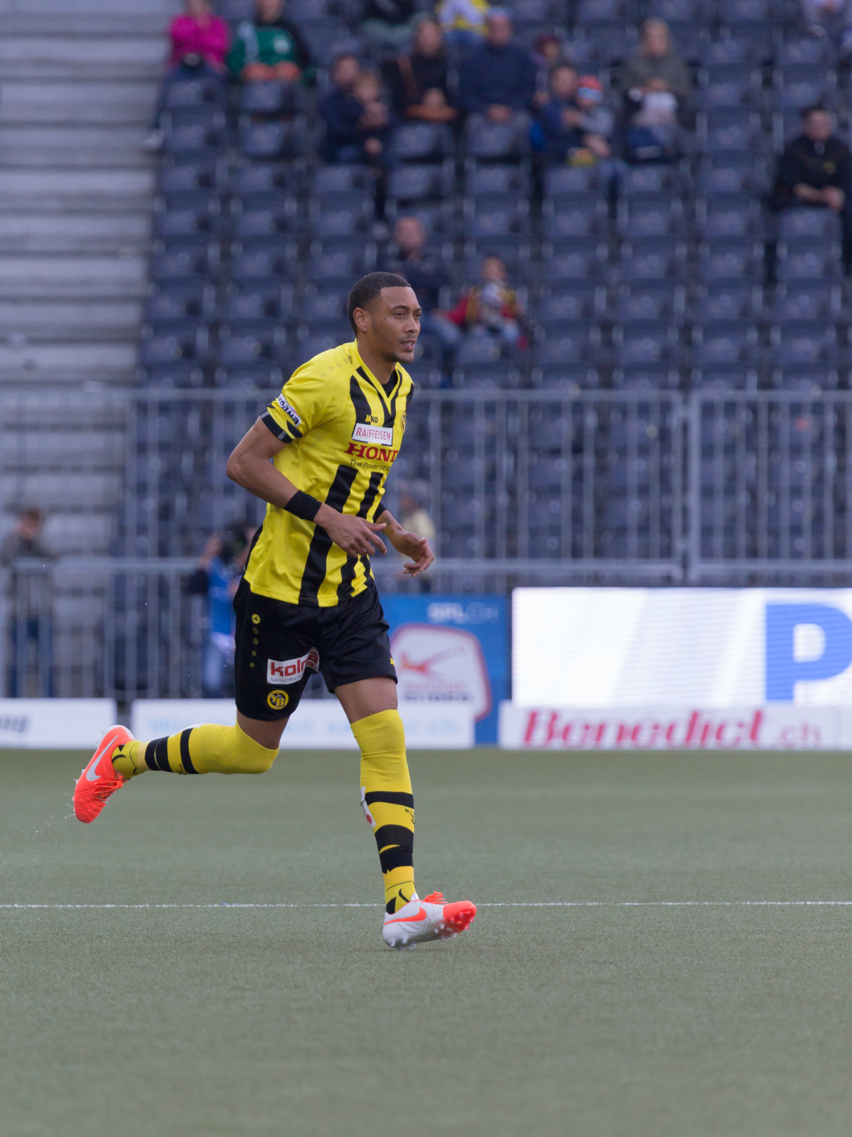 Guillaume Hoarau bei seinem Pflichtspieldebut für den BSC Young Boys: Einwechslung für Renato Steffen im Spiel gegen den FC Luzern